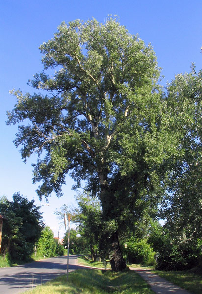 Topol bílý v Lochotínské ulici.